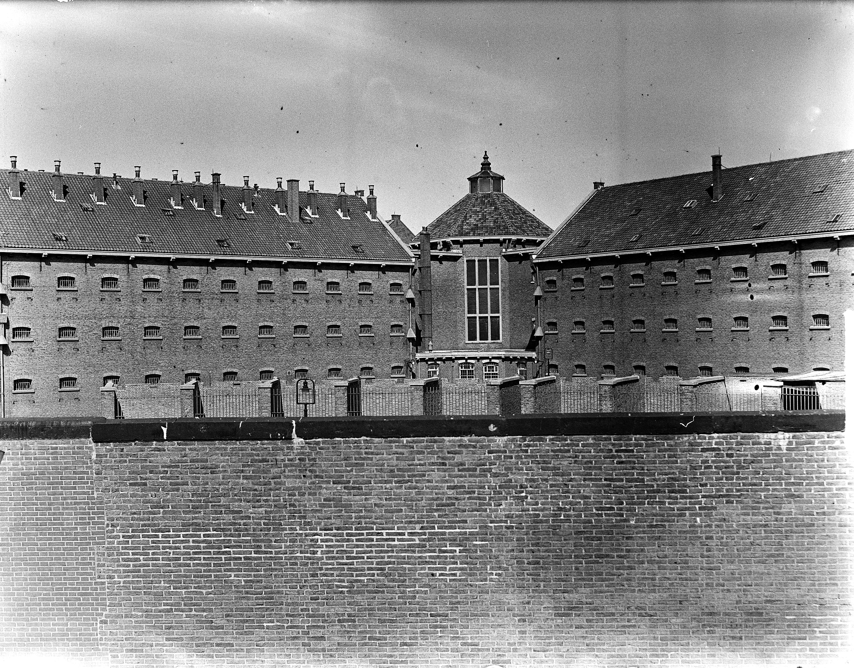 Cellenbarakken van Strafgevangenis Scheveningen, gezien van buiten de gevangenismuur.